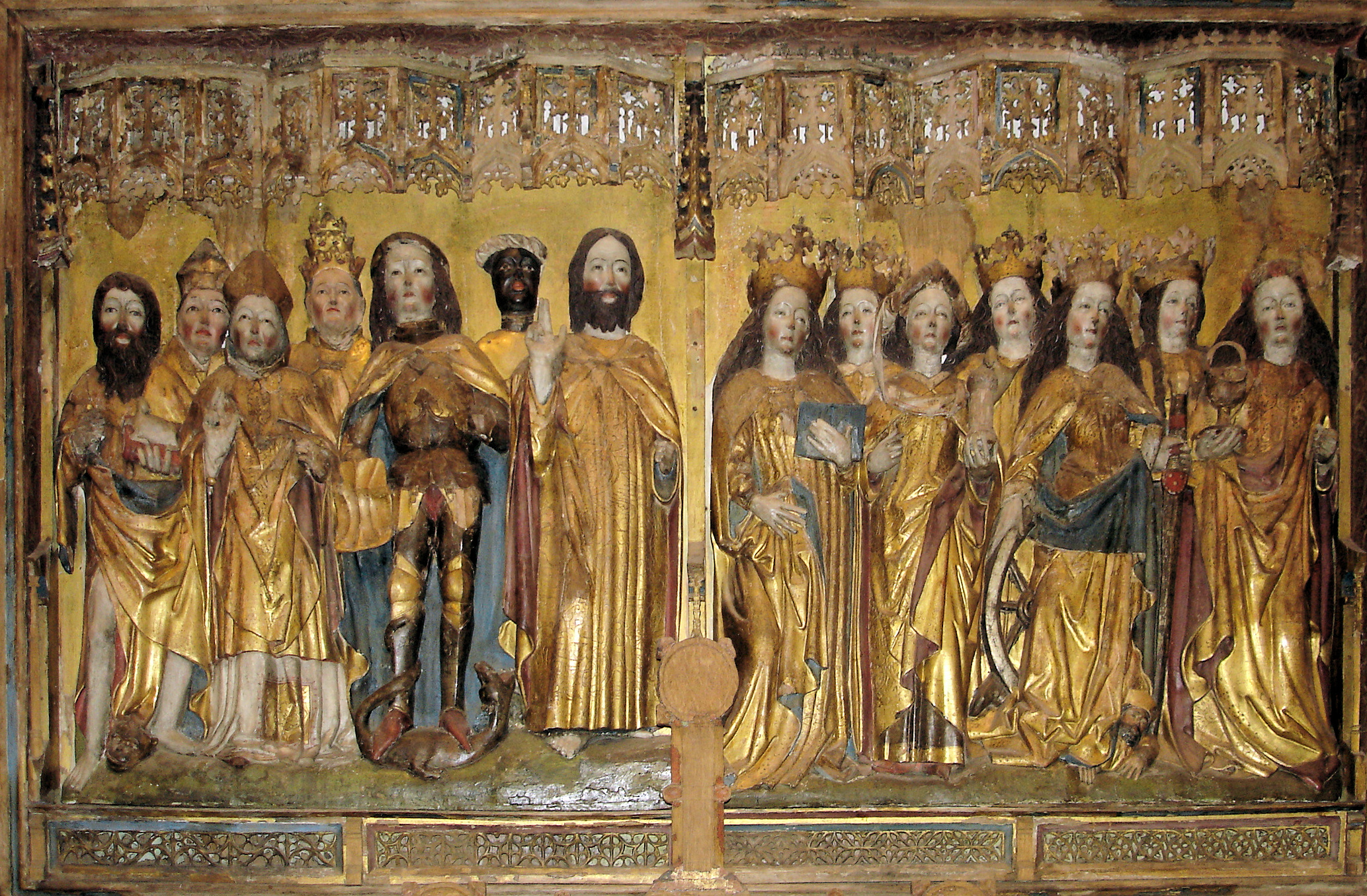 Kirche Warnemünde Altar Detail (Mittelteil)